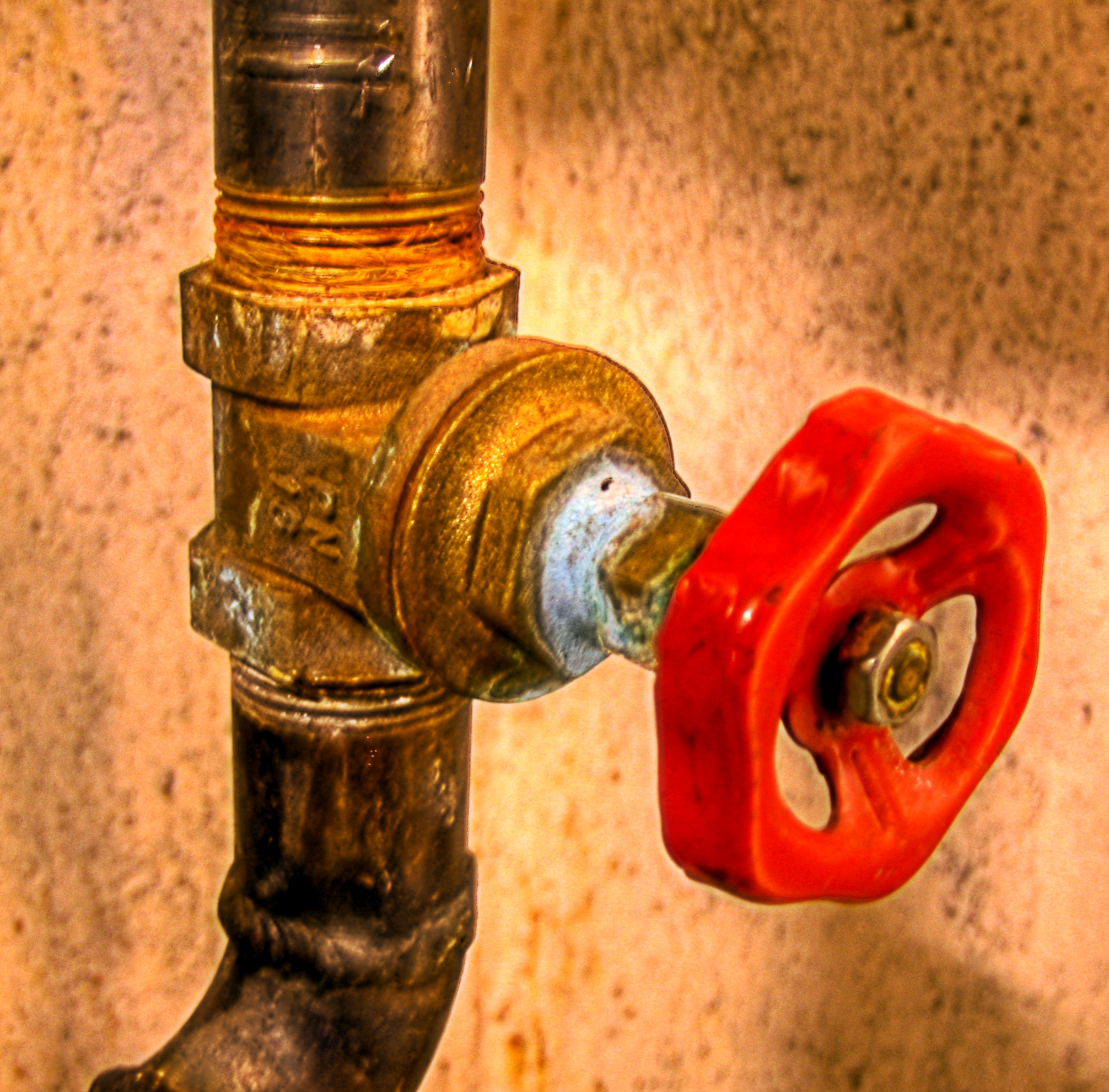 Absperrschieber für Heizungsrücklauf, undicht, mit Kalkablagerungen